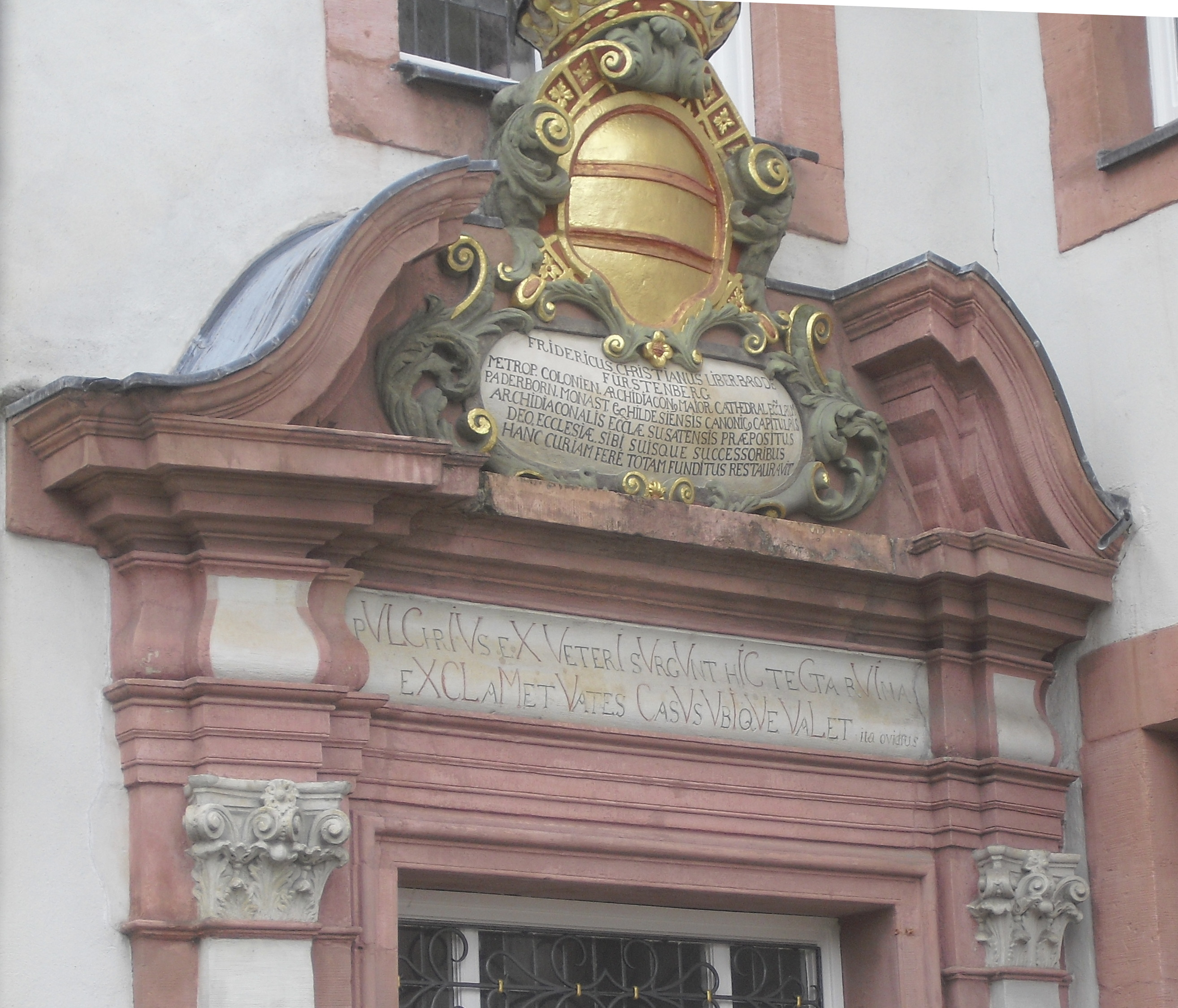 Inschriften und Wappen am Portal des Fürstenhofs in Paderborn